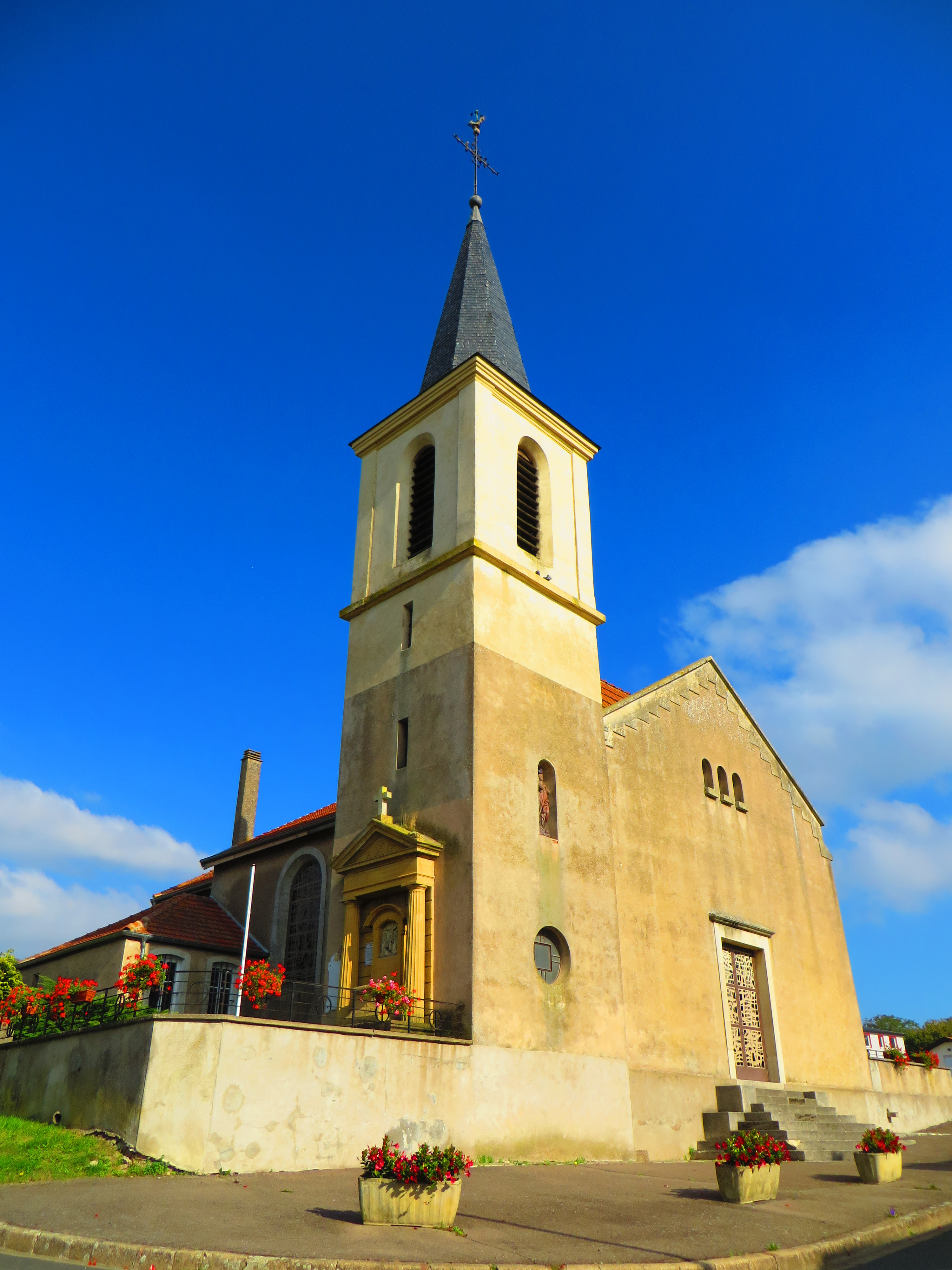 Malaucourt-sur-Seille l'église Notre-Dame